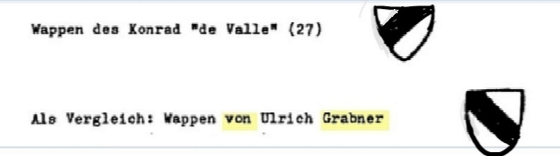 Wappen von Konrad vom Graben (gest. 1307) und Ulrich vom Graben (gest. 1456) mit dem Schrägbalkenwappen der Herren von Graben (auch Grabner, von Thal, de Valle). Cunrad de Valle siegelt mit einem "linken Schrägbalken", während Ulrich Grabner zum Vergleich mit einem rechten Schrägbalken siegelt (Blau-Silber in den Farben). Es handelt sich bei beiden um Familienmitglieder aus der Konradinischen Linie am Graben, in und um Graz begütert